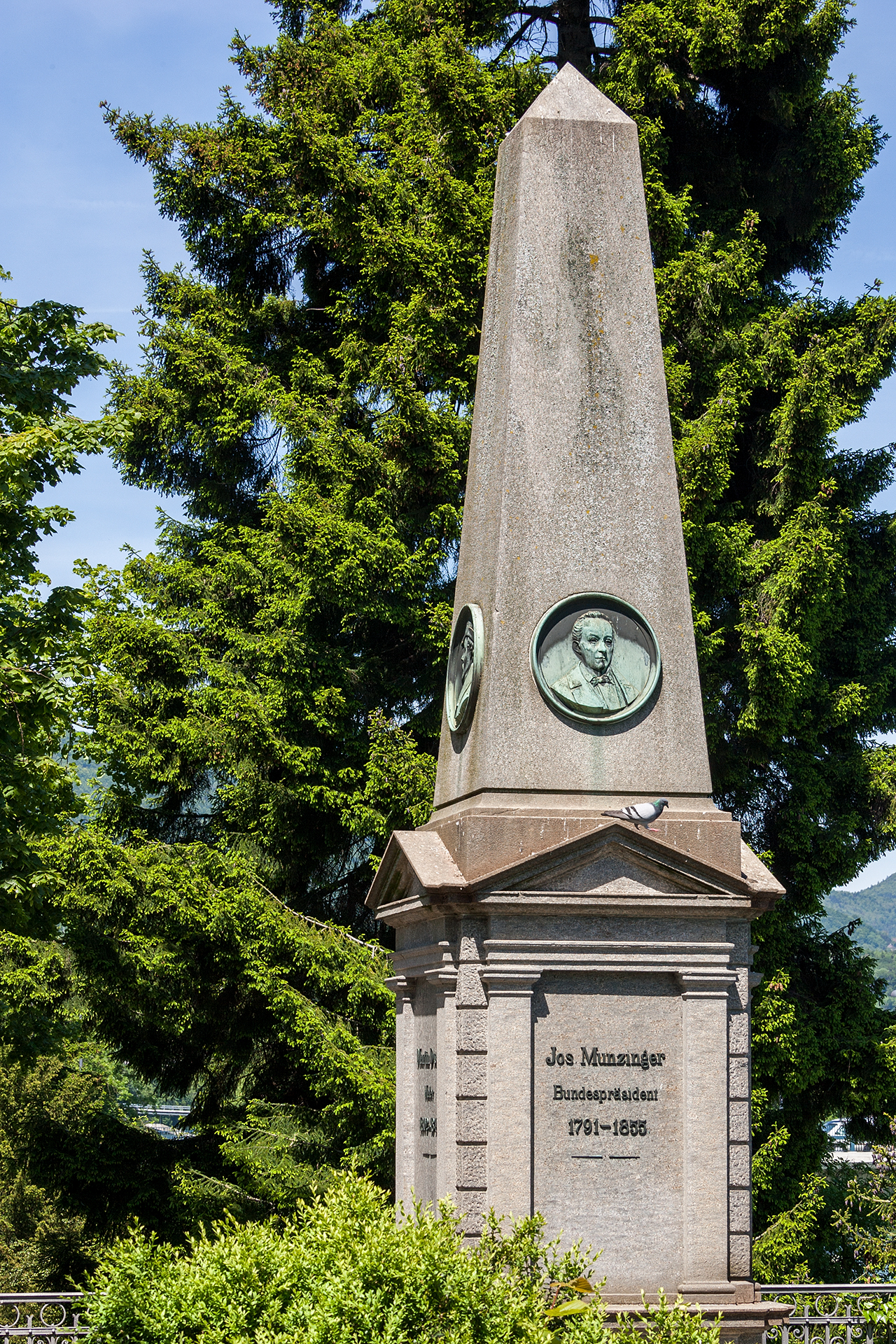 Denkmal (u.a. Bundesrat Munzinger) in Olten (SO)